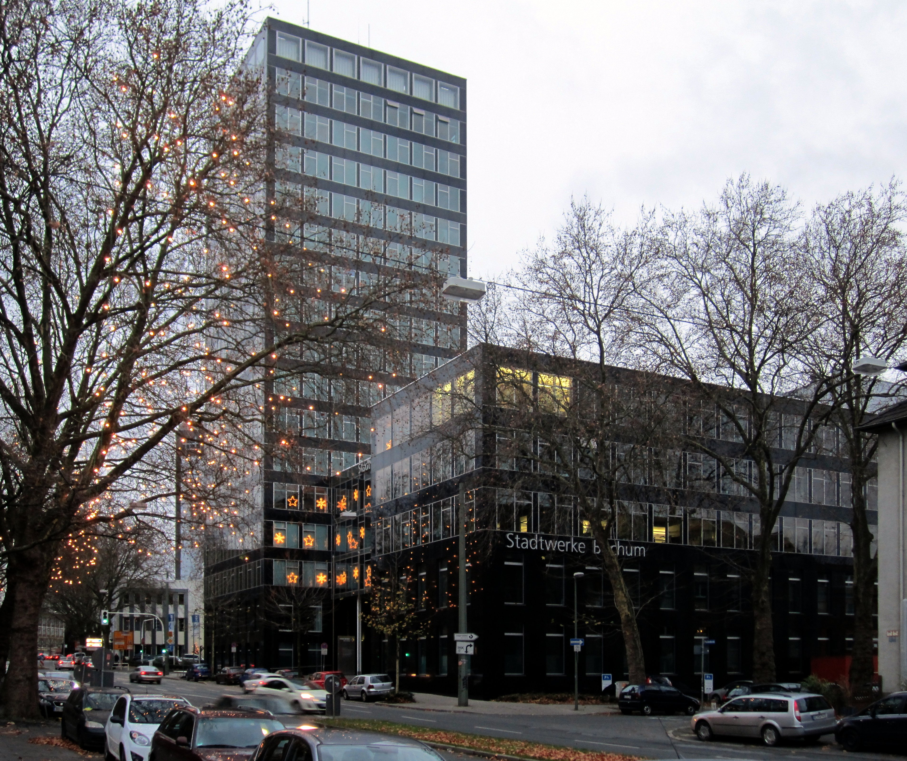 Verwaltung der Stadtwerke Bochum, erbaut 2004